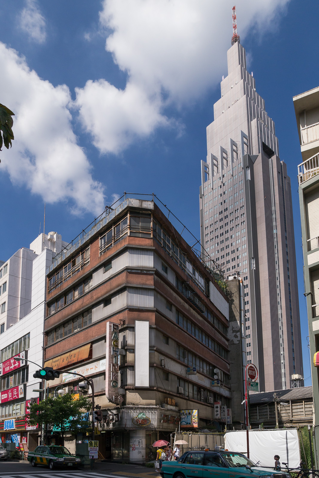 代々木会館、東京都渋谷区代々木。